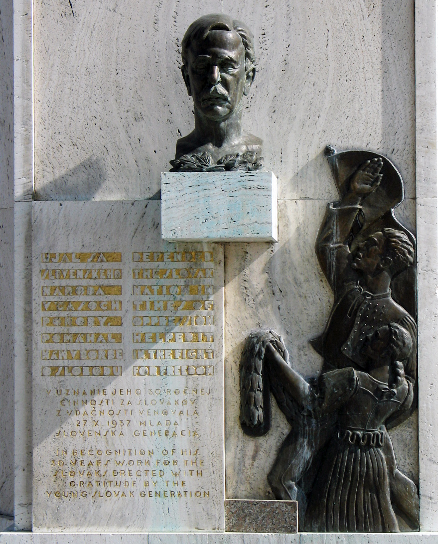 Pomník Setnovi-Watsonovi na budove kostola v Ružomberku